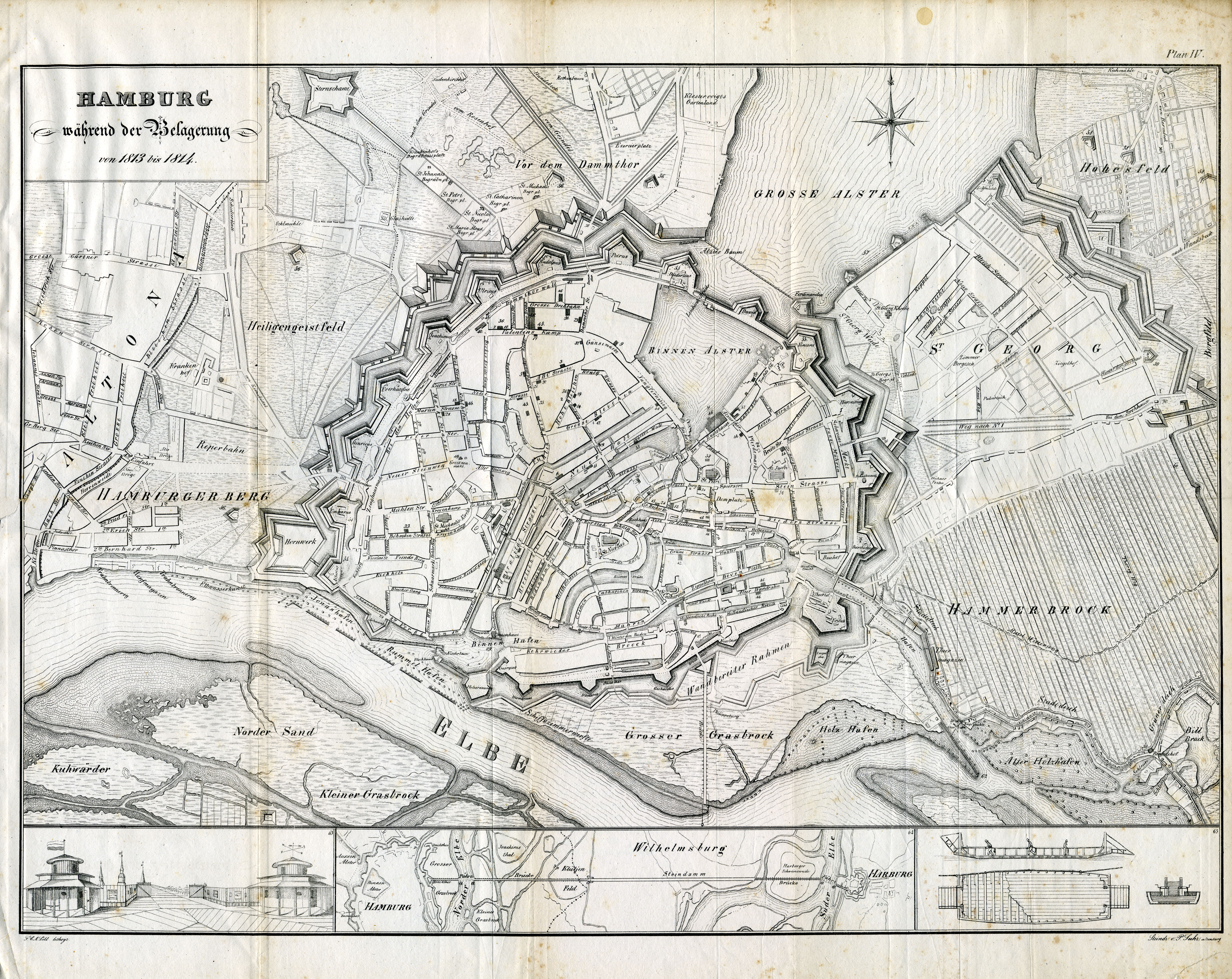 Karte von Hamburg während der französischen Besatzung 1813/1814 Gouvernements-Pallast. General-Direction der hohen Polizei. Die Liquidations-Commission. Verwaltung des Wasser- und Forstwesens (XXX Conservation). Commandatur des 32. Militair-Division. Direction des Fortificationswesens. Commandatur der 34. Gensd'armerie-Legion. Bureau der See-Einschreibung. Ordonnateur der 32. Militair-Division. Die Praefectur. Die Mairie. Kaiserlicher Gerichtshof. Tribunal erster Instanz. Handelstribunal. Die Notariatskammer. Aufstellungsort der Guillotine. Bureau des General-Einnehmers. Direction der directen Steuern. Steuer-Perceptur. Administration des Enregistrements und der Domainen. Stempel-Bureau. Bureau des Enregistrements der Civil-Acten. Hypotheken-Bureau. Bureau des Enregistrements der Abgaben von den Erbschaften und Domainen. Bureau der Administration der vereinigten Abgaben. Tabacks-Regie. Entrepôt général des Tabacks. Hotel der Direction der Douanen. General-Bureau derselbst. Bureau derselbst. Prevotal-Gerichtshof. Conciergerie de la cour prévôtale. Bureau der Administration des Dienstes bei den Brücken und Chausseen. 34. Das Postamt. Der Lotterie-Saal. Die Münze. Commandantur des General Hogendorp. Sitz des Recrutirungsrathes. Inspectorat der Buchdruckerei und des Buchhandels. Caserne der Gensd'armen. . Central-Bureau der Octroi. Lombard. Bureau der Patentsteuer. Polizei-Commissariat. Friedensgericht. Militair-Hospital Caserne. Maison de mendicité. Maison de police. Comité d'expertise. . Correctionshaus. Maison d'arrêt. Depot der widerspenstigen Conscribirten. Citadelle (Reduit de l'Elbe). Citadelle (Reduit de l'Alster). Vier Lünettes. Pfahlwand in der Alster. Schanzen vor der Linie von St. Georg. Cavalier bei No. I. Retranchement. Retranchement bei Brandshof. Rampe oder Auf- und Abfahrt der Brücke. Die Lage der Brücke von Hamburg über die Elbinseln nach Harburg. Die Fähre.